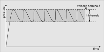 Un grafic timp/presiune în care apare explicit conceptul de histerezis. Presiunea este menținută sub valoarea nominală.